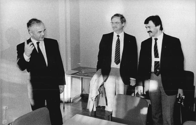 24.10.90- Potsdam: Die Ampel-Koalition im brandenburgischen Landtag ist perfekt. Die letzten Gespräche zwischen Manfred Stolpe (SPD) (l.), FDP-Landesvorsitzenden Dr. Knut Sandler (m.) und dem Fraktionsvorsitzenden der FDP, Rainer Siebert (r.), haben dieses Ergebnis gebracht. ADN- Karlheinz Schindler